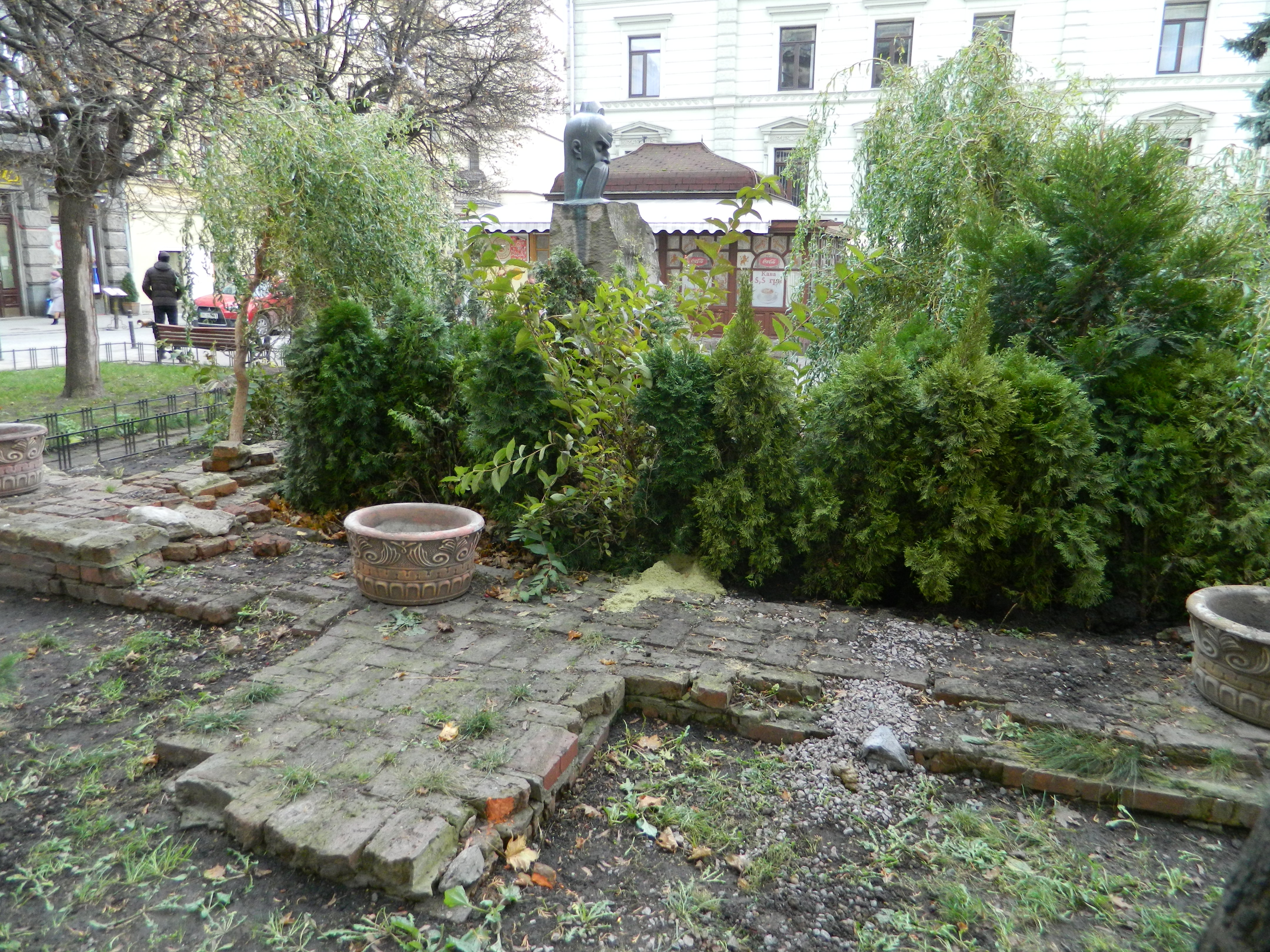 Остатки древних стен на площади Подковы